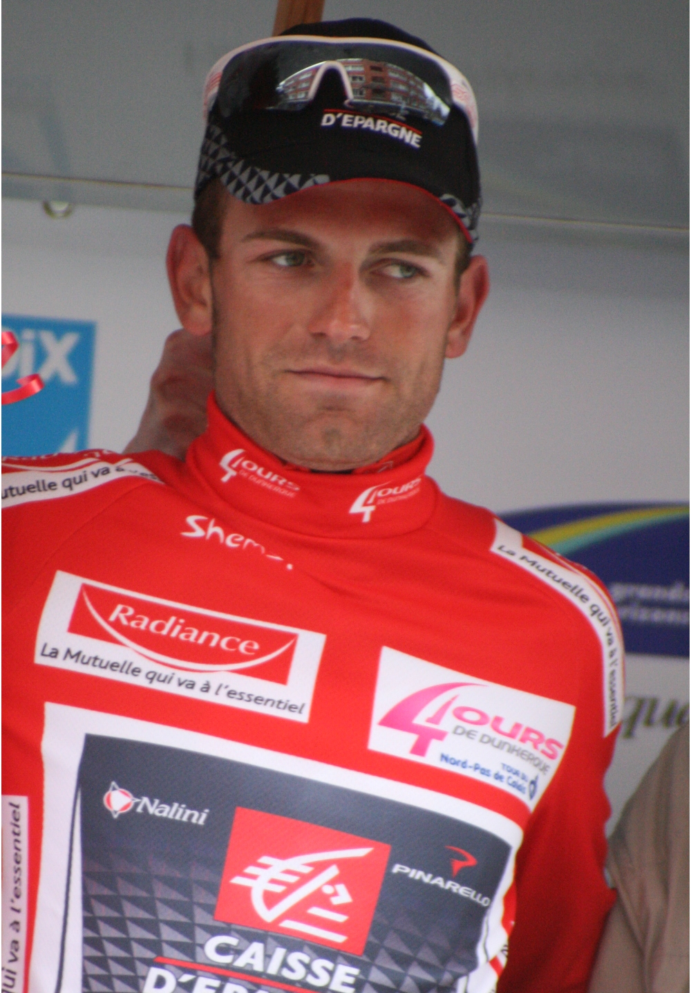 José Joaquin Rojas sur le podium de la 5e étape des Quatre jours de Dunkerque 2010